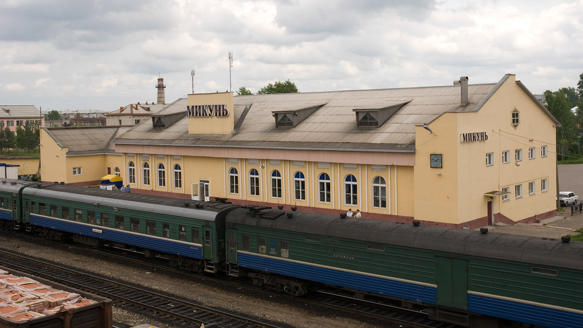 Вокзал станции Микунь